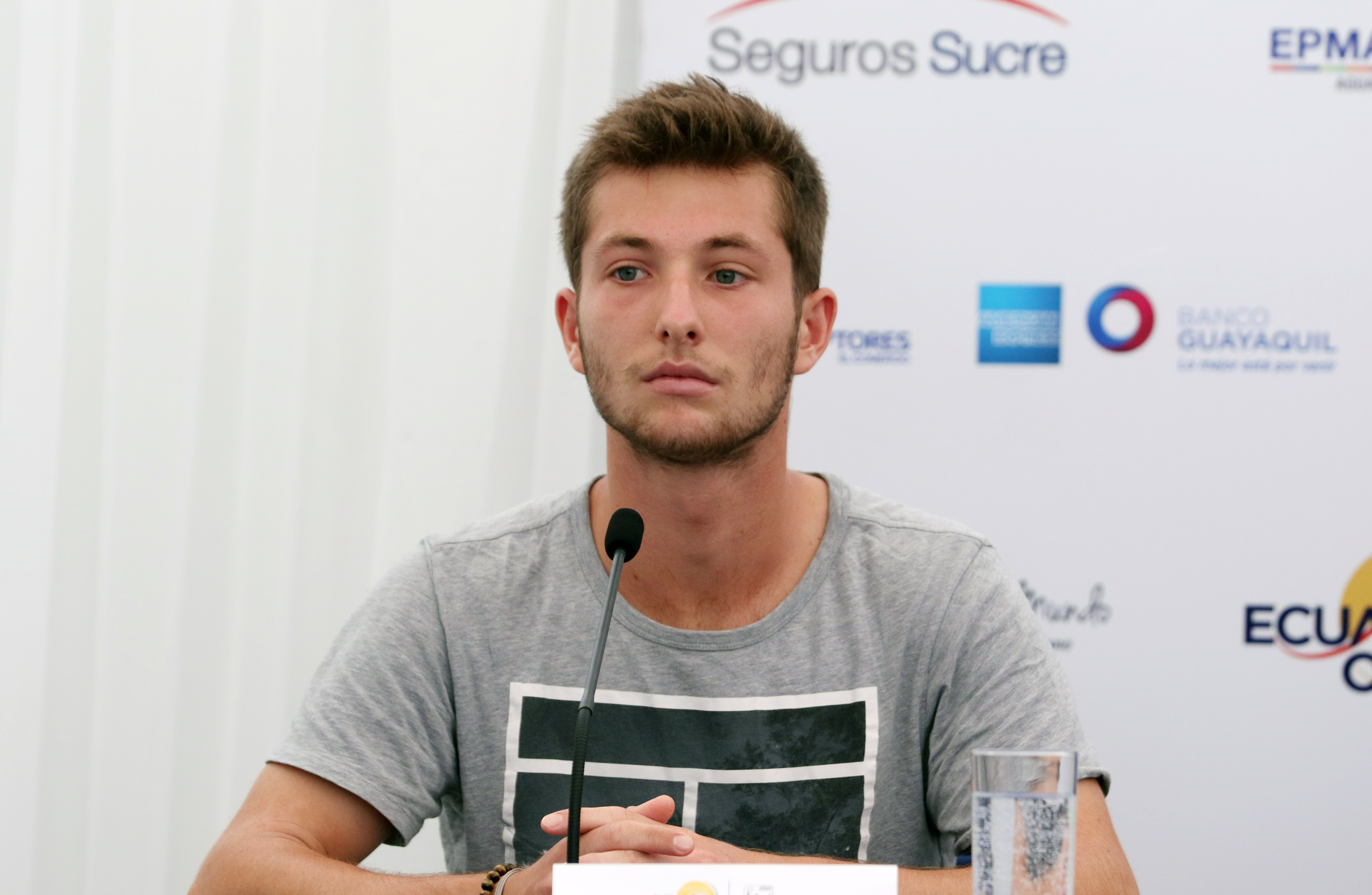 Quito, 02 de febrero de 2018 (Andes).- Un año más de vida celebra el ATP 250 Ecuador Open. En la cuarta edición ondean banderas de 14 países cuyos representantes luchan por el título y, de manera simbólica, por el trofeo del General Rumiñahui, obra del maestro Oswaldo Guayasamín. En la gráfica el francés Corentit Moutet, jugador ANDES/Micaela Ayala V.